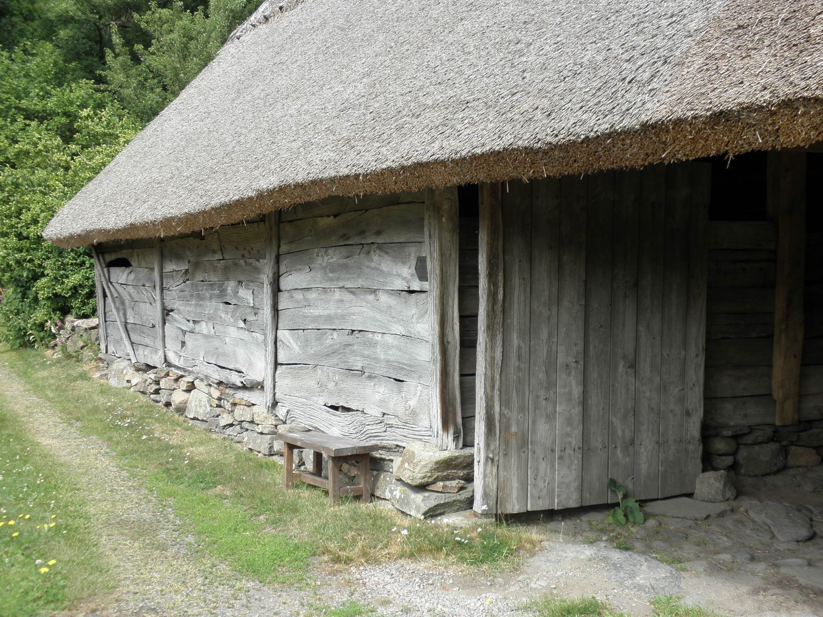 Åkraberg